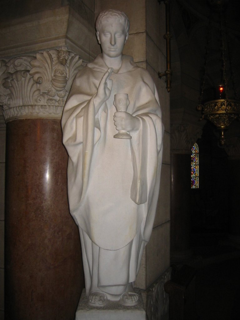 Saint Férréol de Besançon (Ferreolus of Besançon)